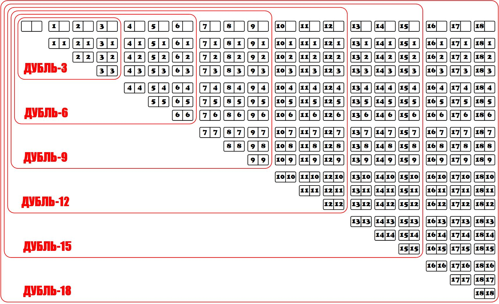 Состав наборов классического домино.